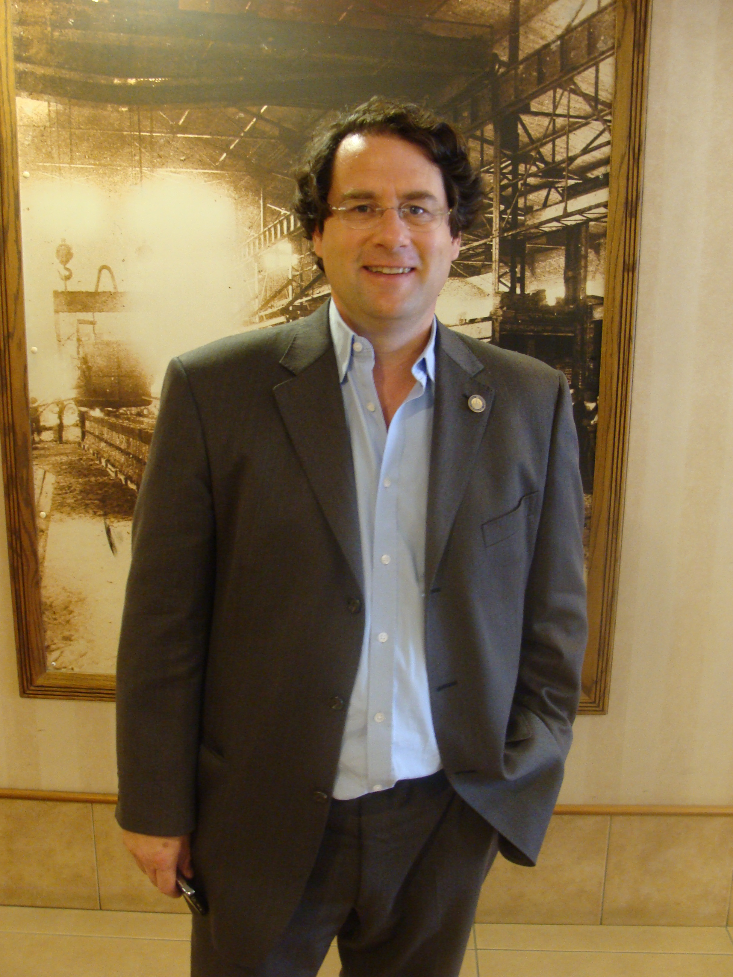 Bernard Drainville à l'hôtel Gouverneurs de Trois-Rivières.